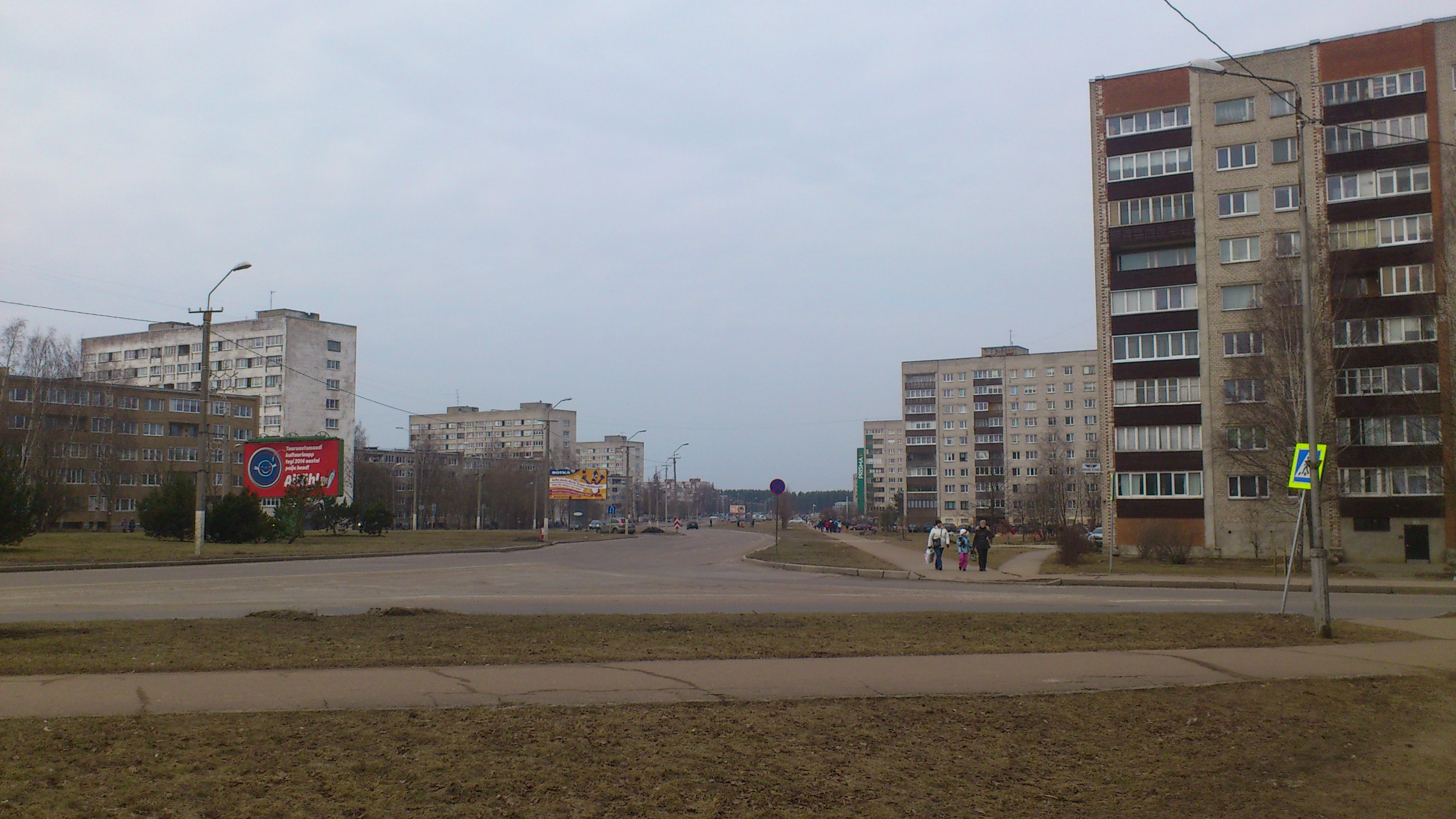 Kangelaste prospekt, Narva